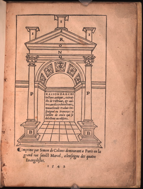 Diego de Sagredo: Raison d'architecture antique. Simon des Colines: Paris, 1542.